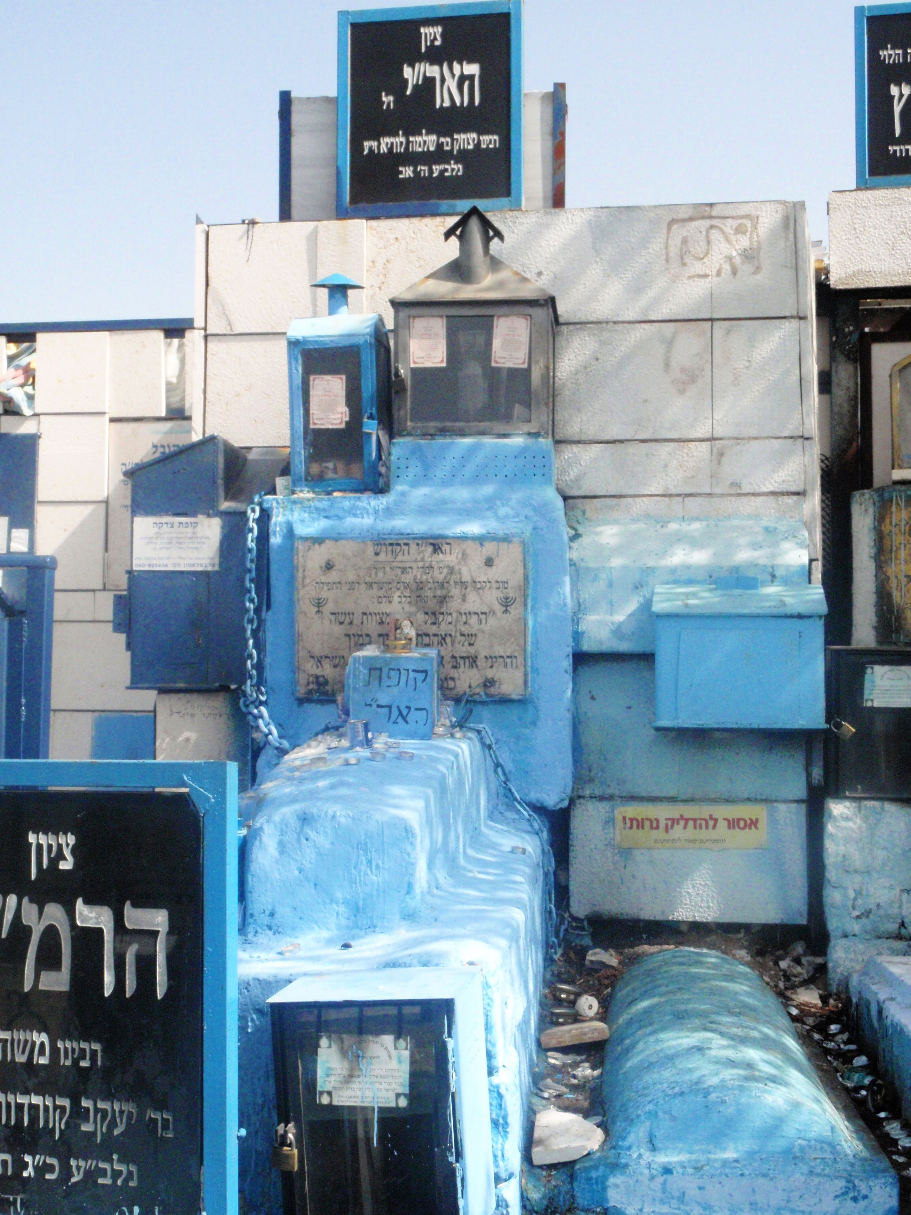 Israël - Safed - tombe du Ari (Isaac Luria)